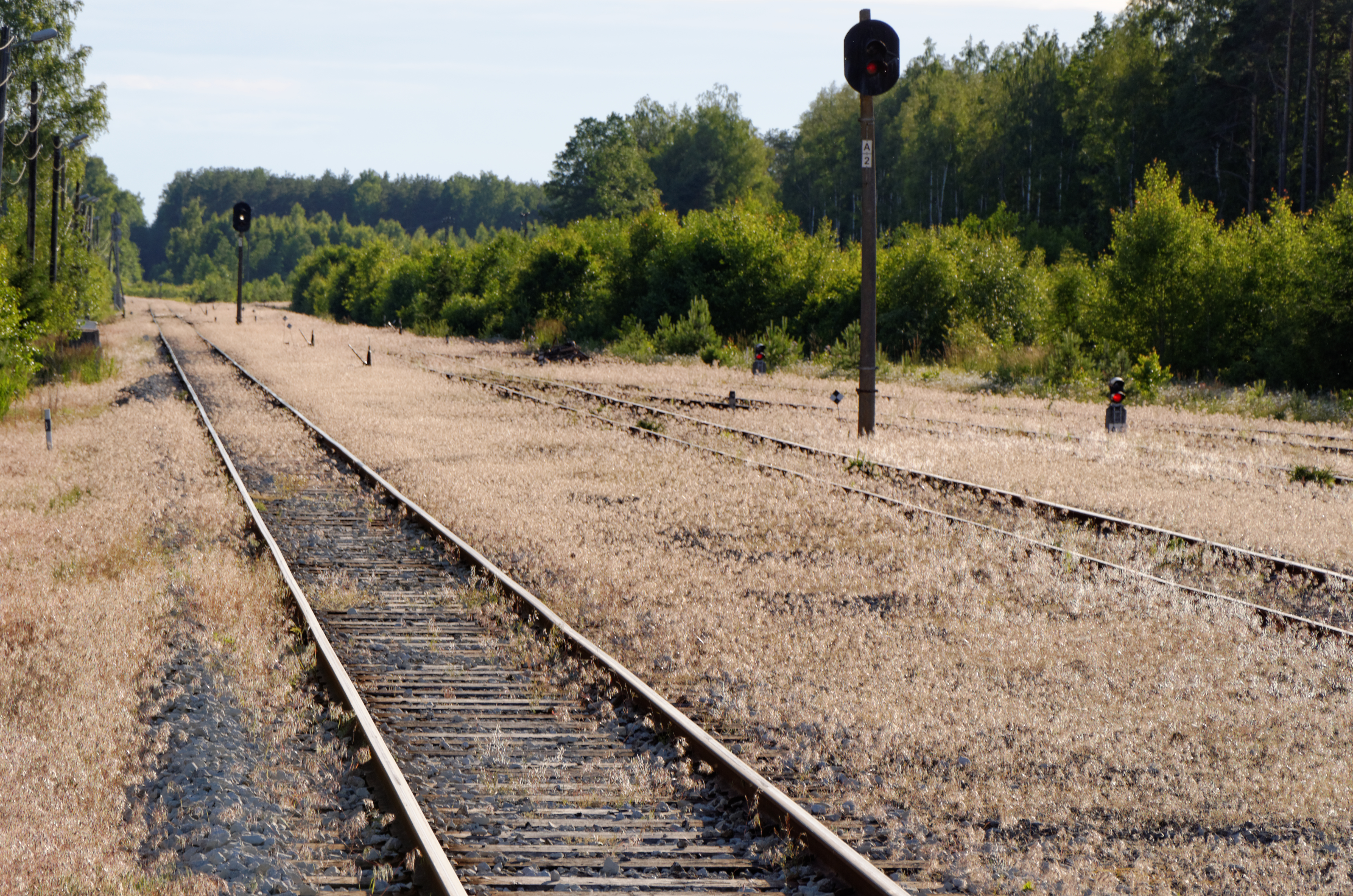 Pärnu kaubajaam